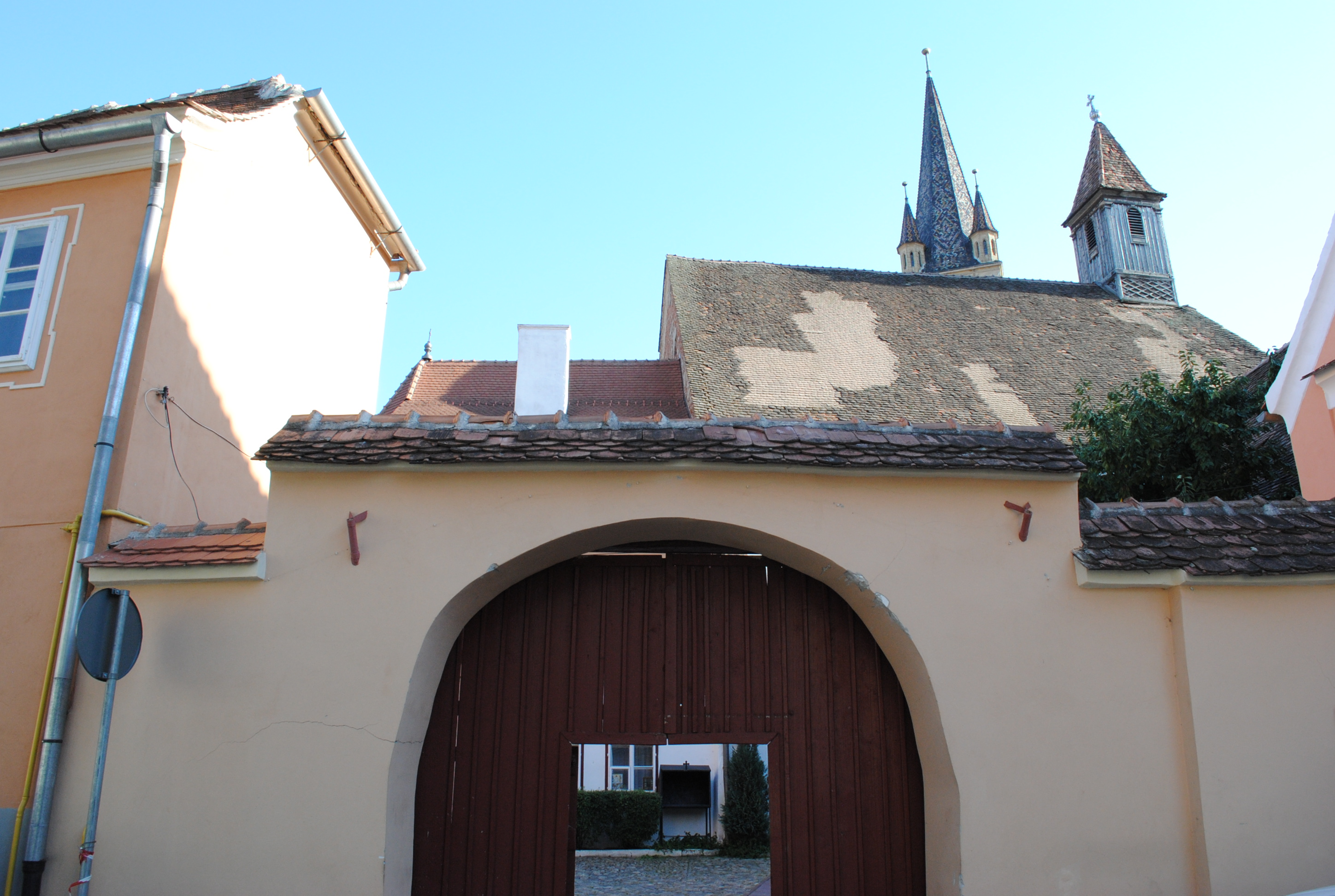 Ansamblul Azilului, sec. XIII - XVIII